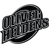 Het logo van deephouse producent Oliver Heldens.